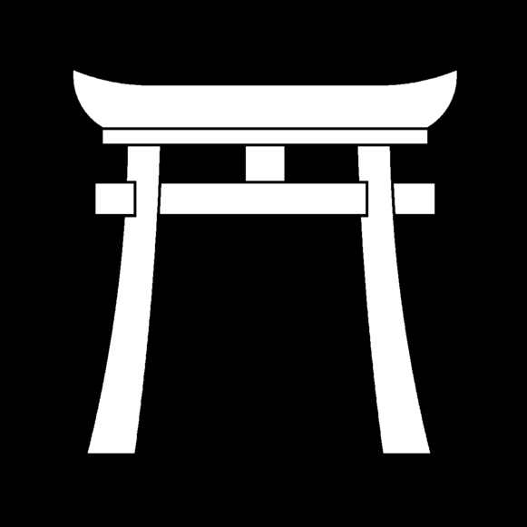 鳥居（とりい）は、日本の家紋「鳥居紋」の一種である。主に鳥居氏や、宇都宮氏流の一族の多くが用いた。